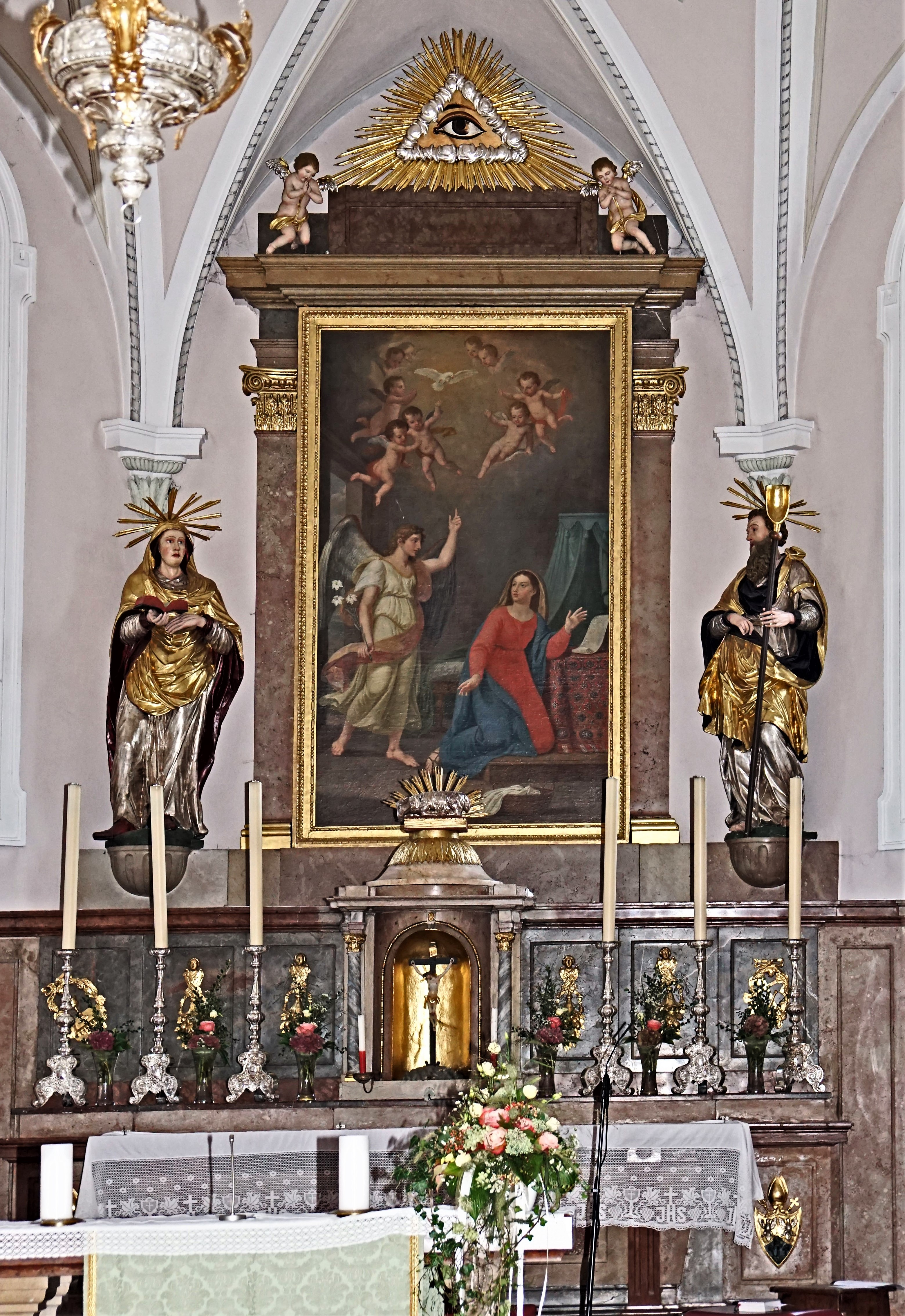 Pfarrkirche Mariä Verkündigung Grödig, Hochaltar